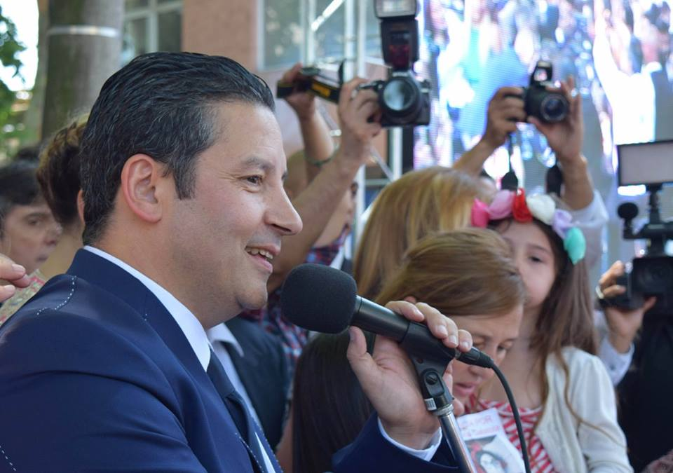 Gustavo Menendez en su discurso inaugural para los vecinos